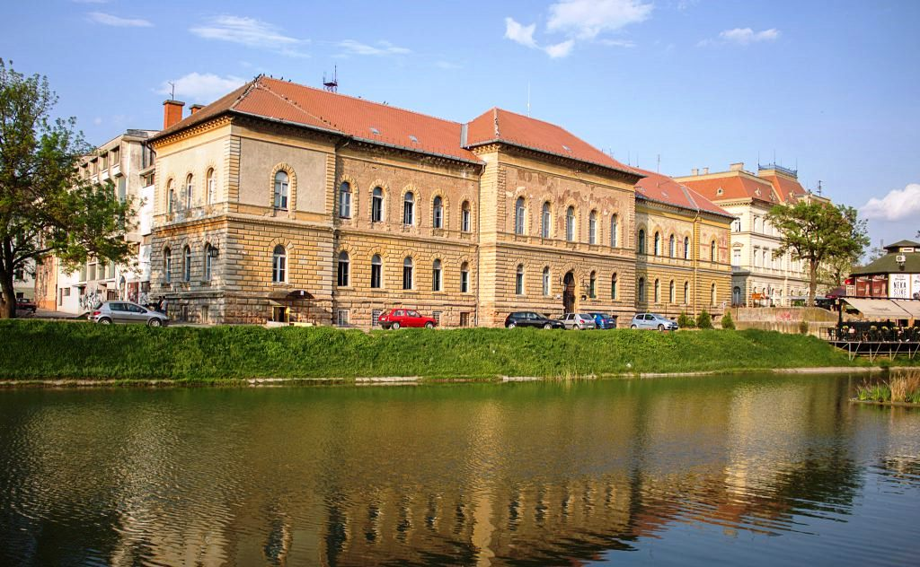 Електротехничка и грађевинска школа "Никола Тесла" у Зрењанину